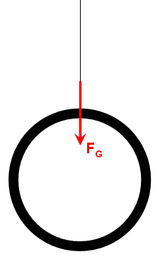 Aanduiding van de gewichtsvector op een ring met touw